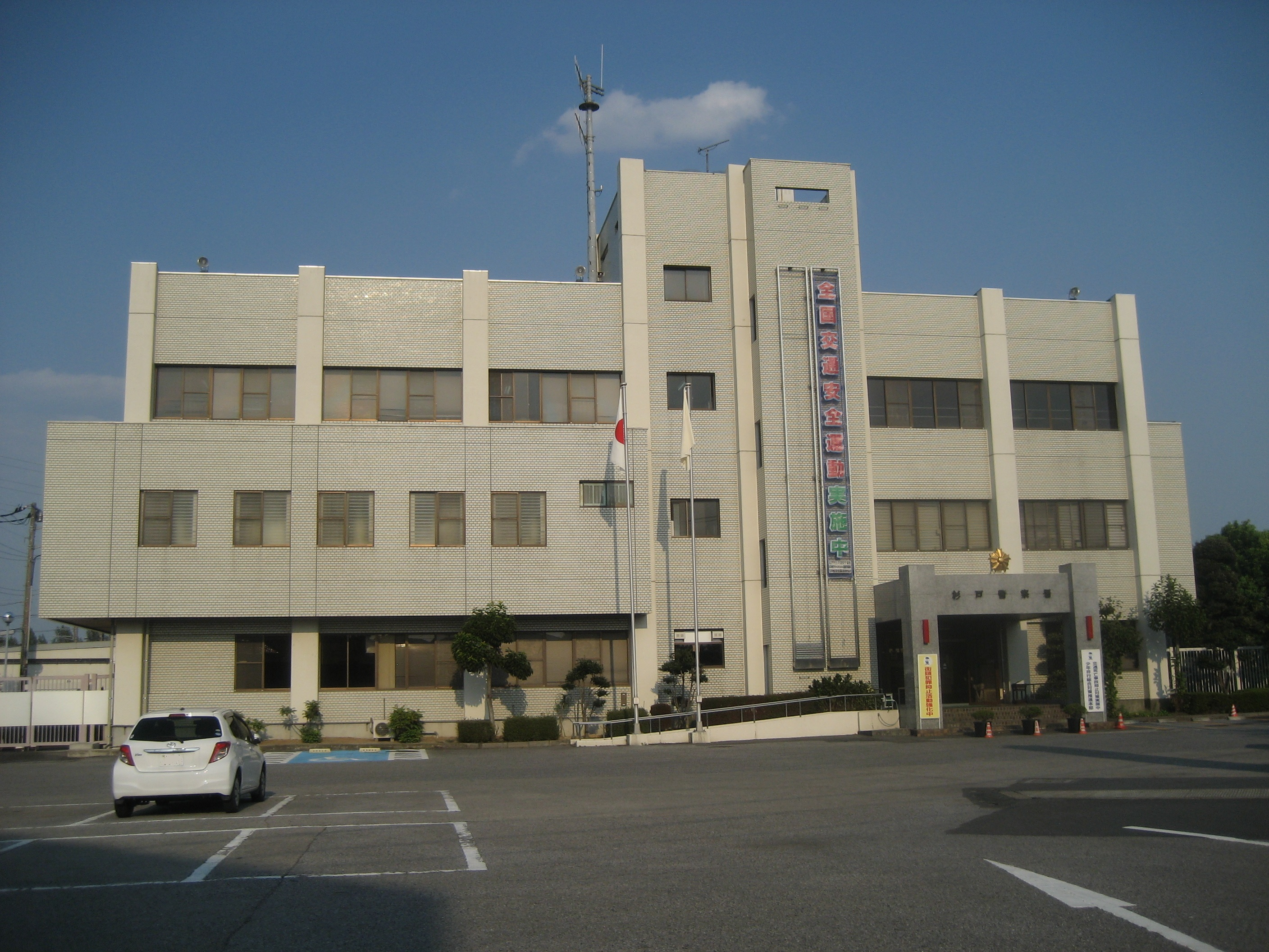 埼玉県杉戸警察署庁舎